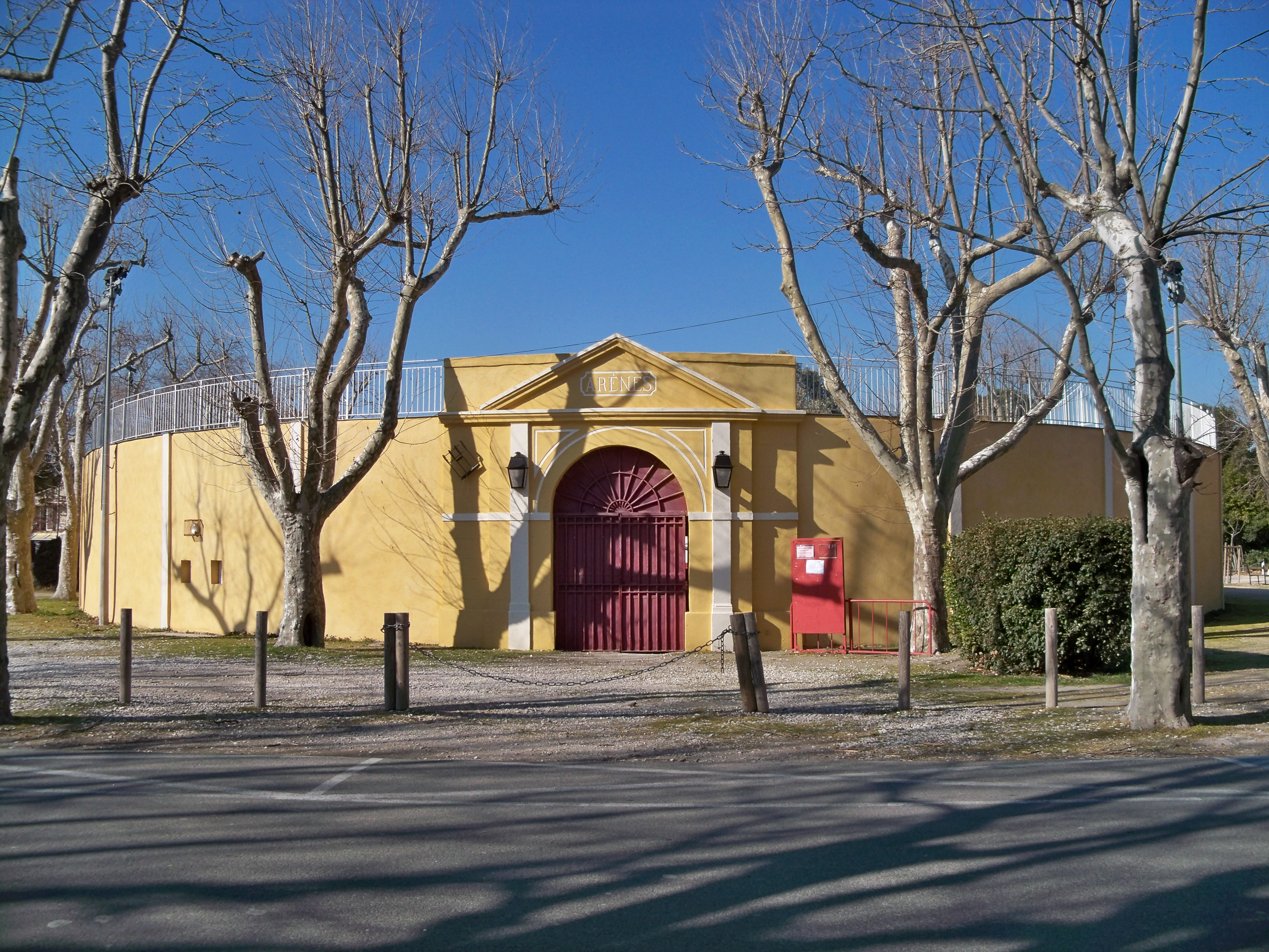 Arènes de Salin de Giraud